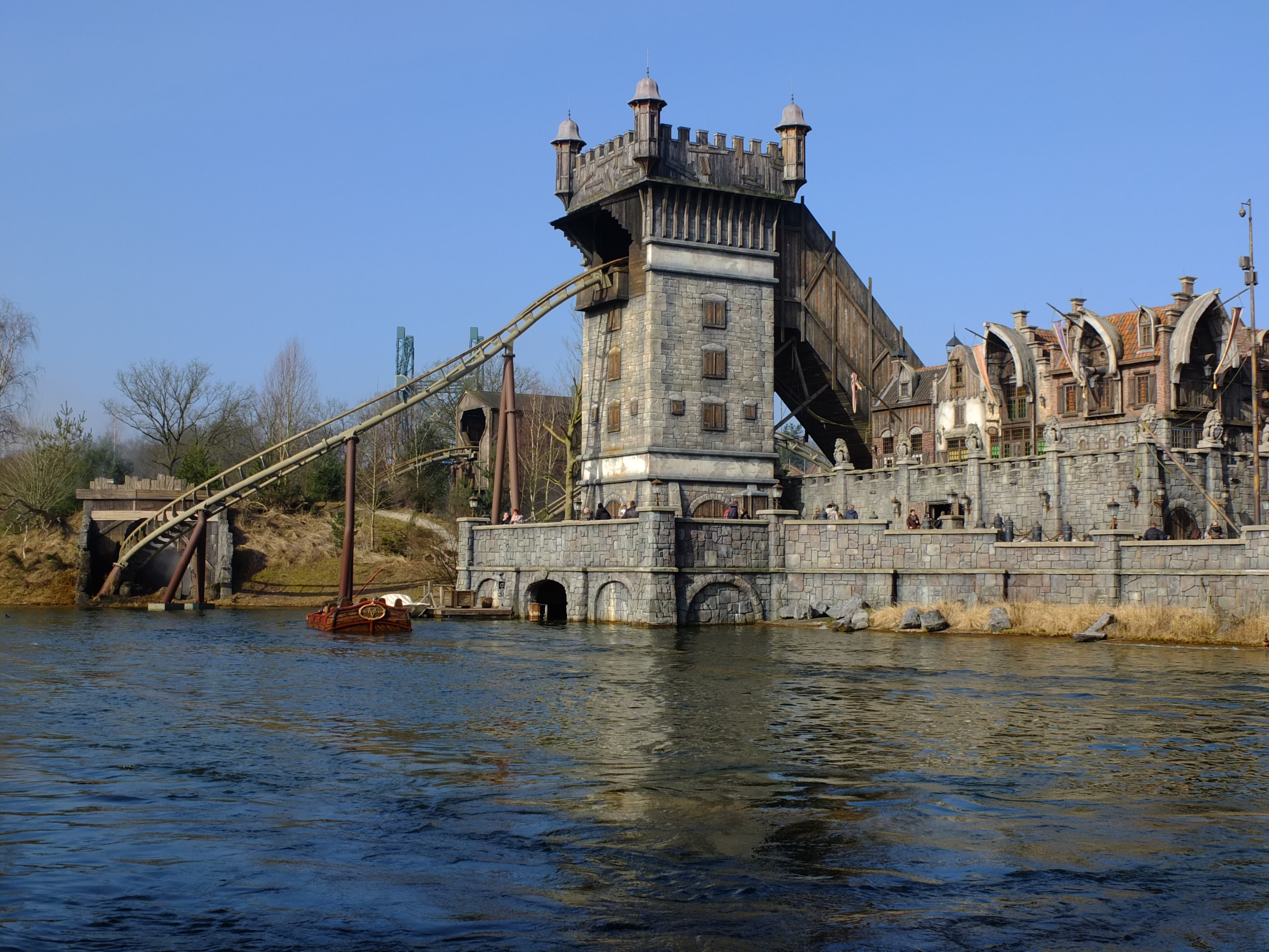 De Vliegende Hollander